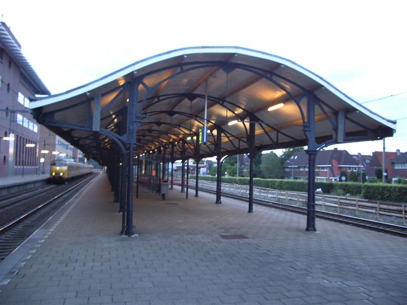 Hilversum